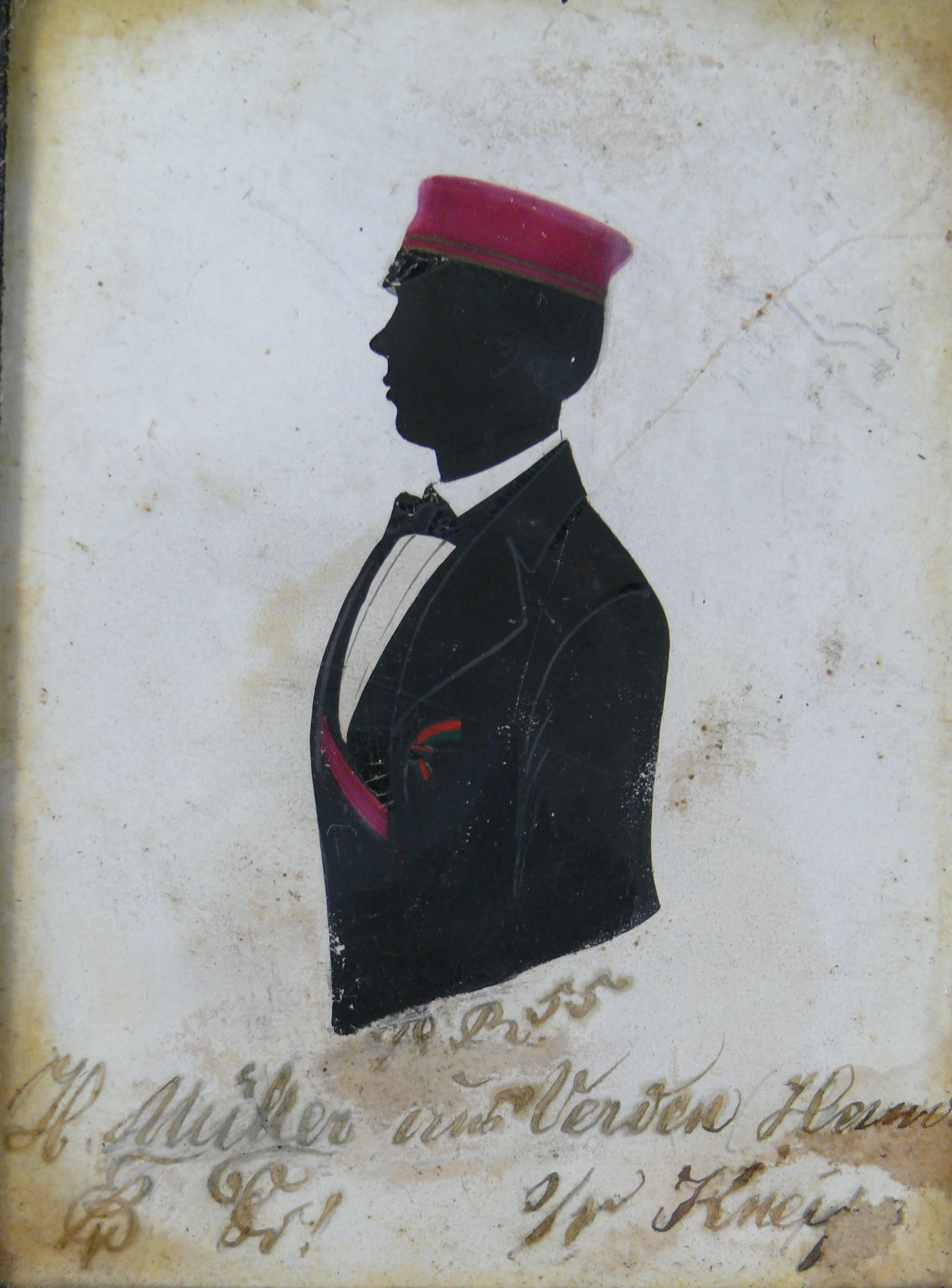 Silhouette von Heinrich Müller (1834-1906)